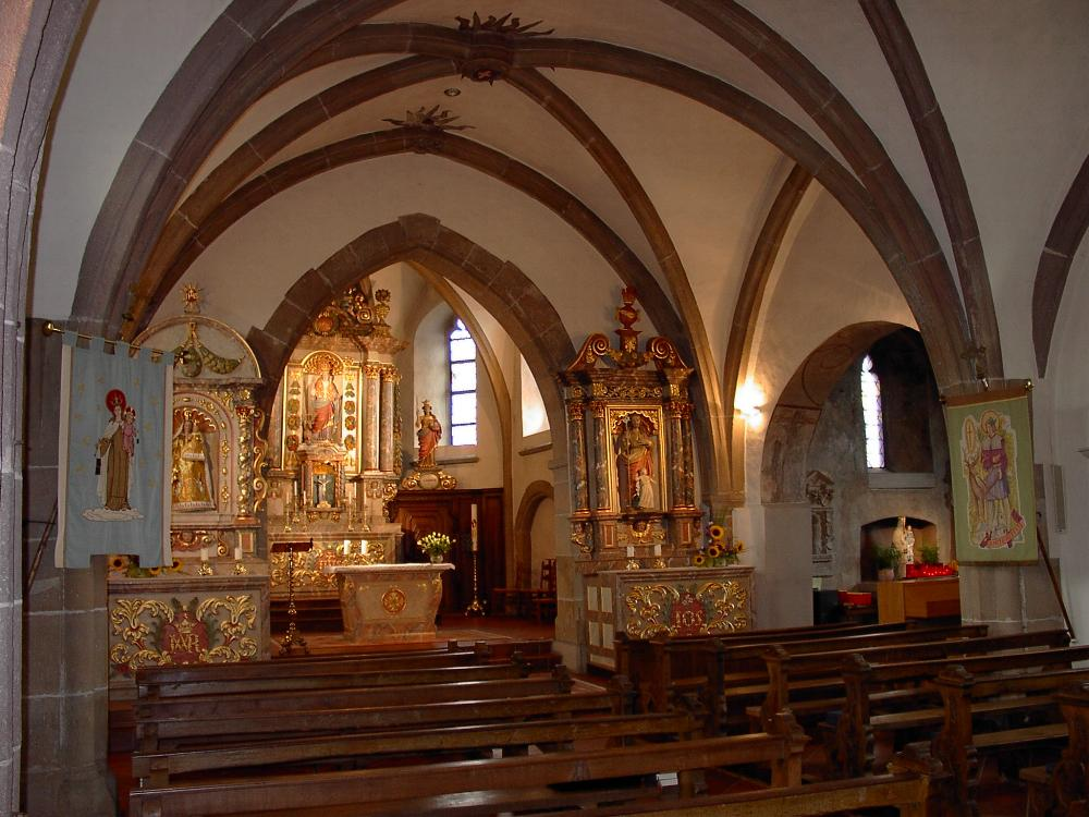 E Bléck an di Munzer Parkierch. Photo vum User Pear 15:47, 20 August 2006 (UTC). Munzen Kategorie:Gemeng Munzen